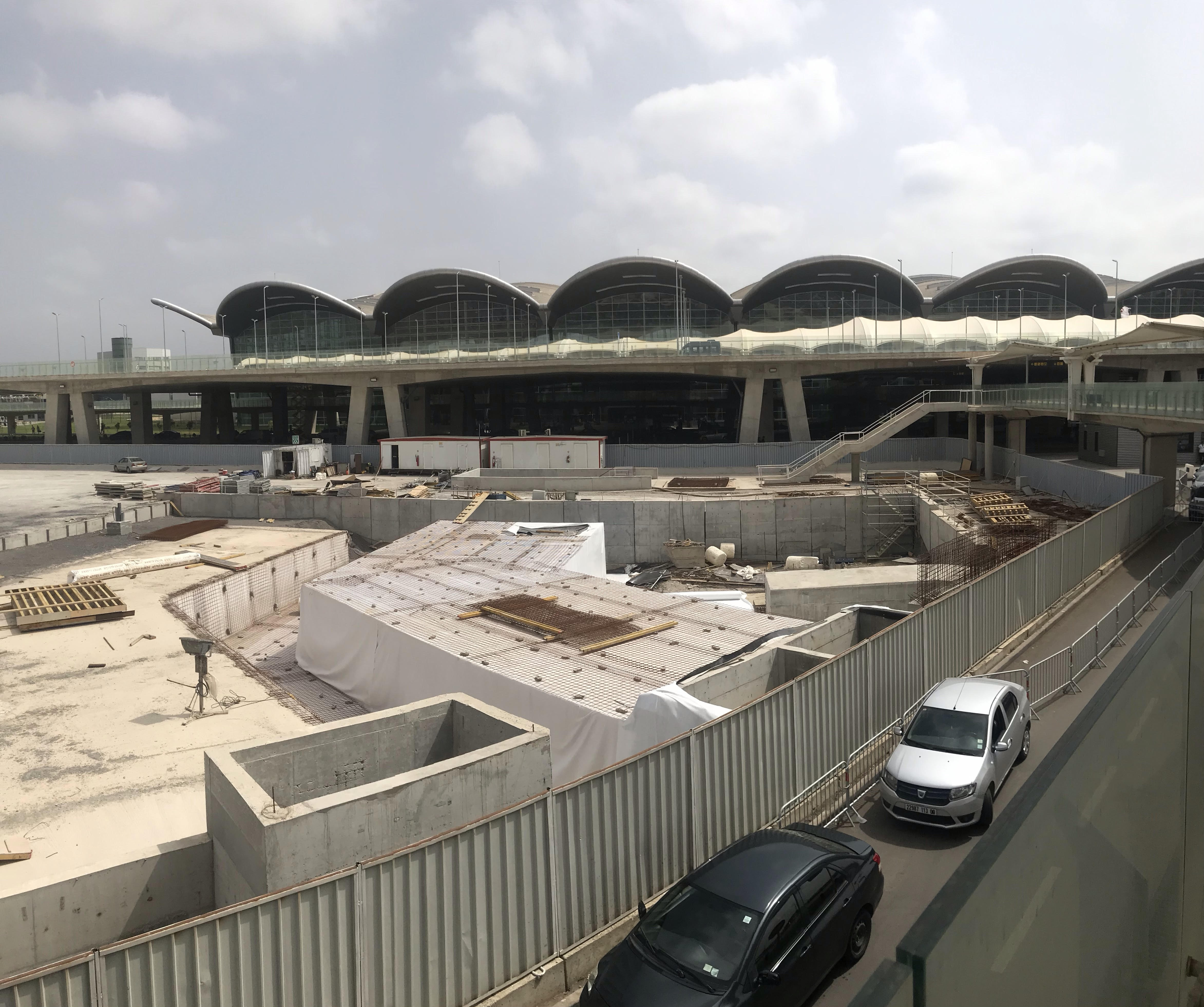 station aéroport du métro d'Alger